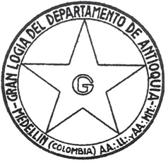 Logo extraído del Manifiesto Saludo, instalación e historia de la “Gran Logia del Departamento de Antioquia” con sede en Medellín del 16 de diciembre de 1934